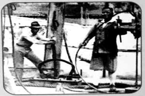 近代石油工业奠基人孙越崎(右)在陕北延长油矿